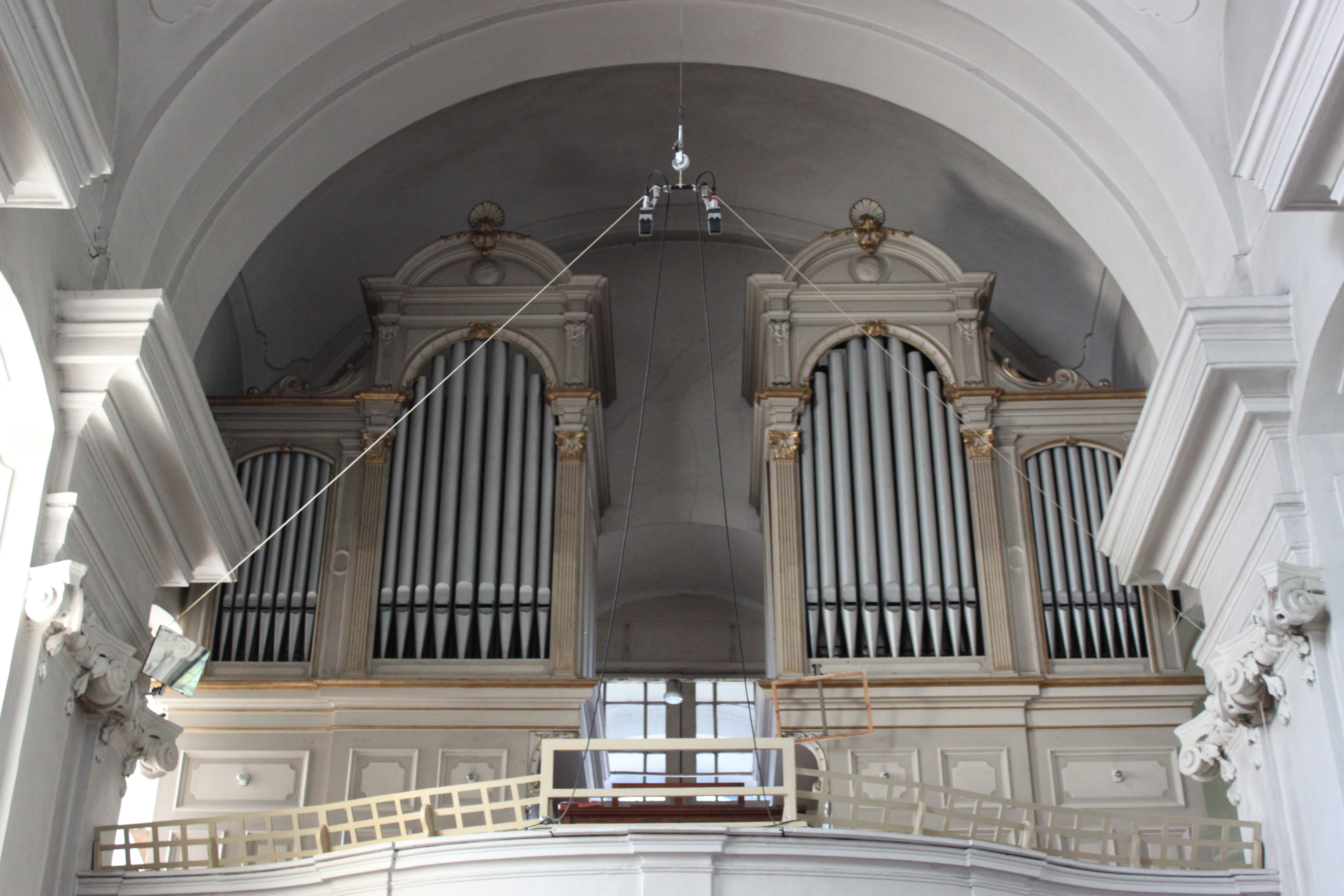 Orgel der Pfarrkirche Oberlaa, errichtet 1903 von Matthäus Mauracher II., Graz.